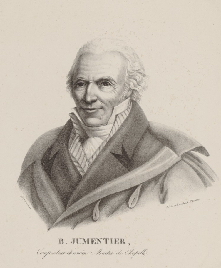 Bernard Jumentier (1749-1829), compositeur et ancien maître de chapelle